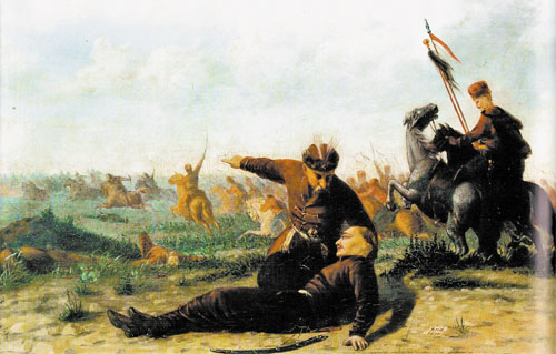 Картина К. Устияновича.